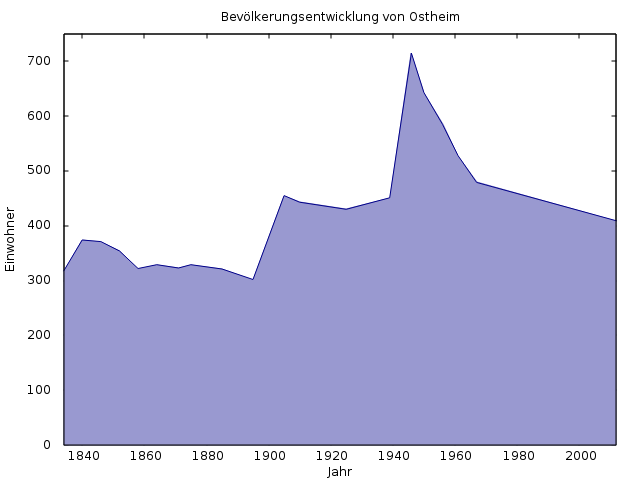 Einwohnerentwicklung des Ortes Ostheim(Malsfeld)